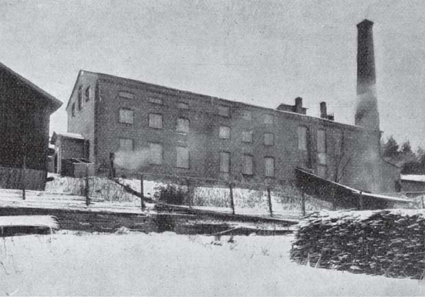 Santalahden Paperitehdas